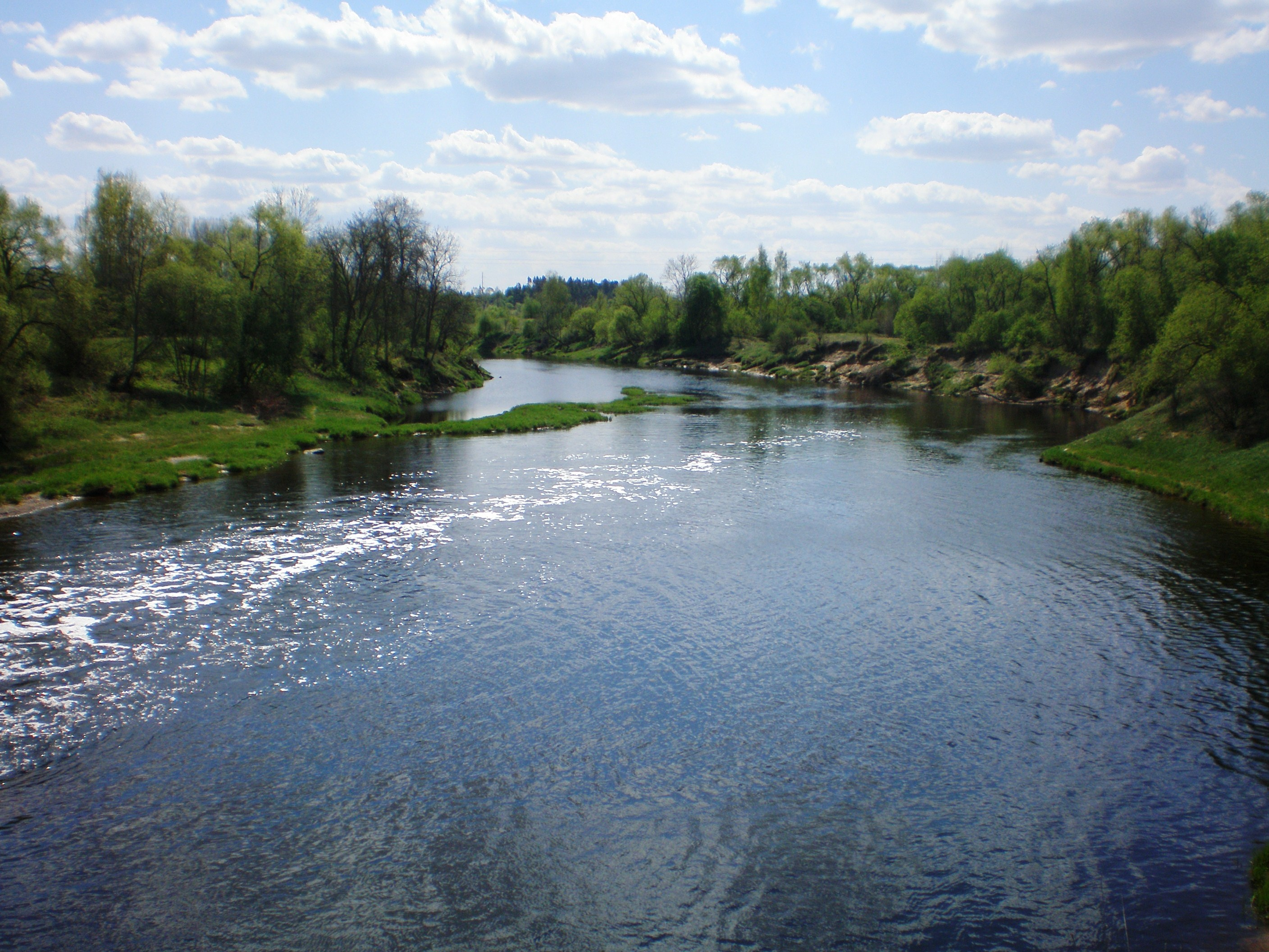 Nevėžis tuoj už Kruosto HE užtvankos, Kėdainių raj.